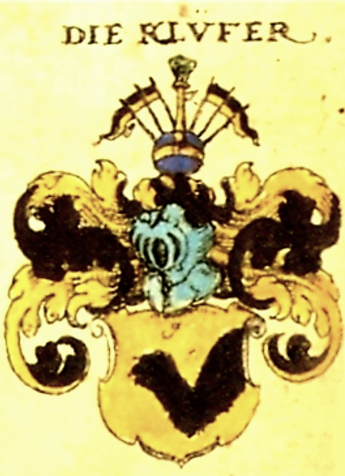 Wappen derer Clüver (Klüver/Klüfer), bremen-verdischer Uradel, stammesverwandt mit den Schucke/Schocke und Schlep(p)egrell.